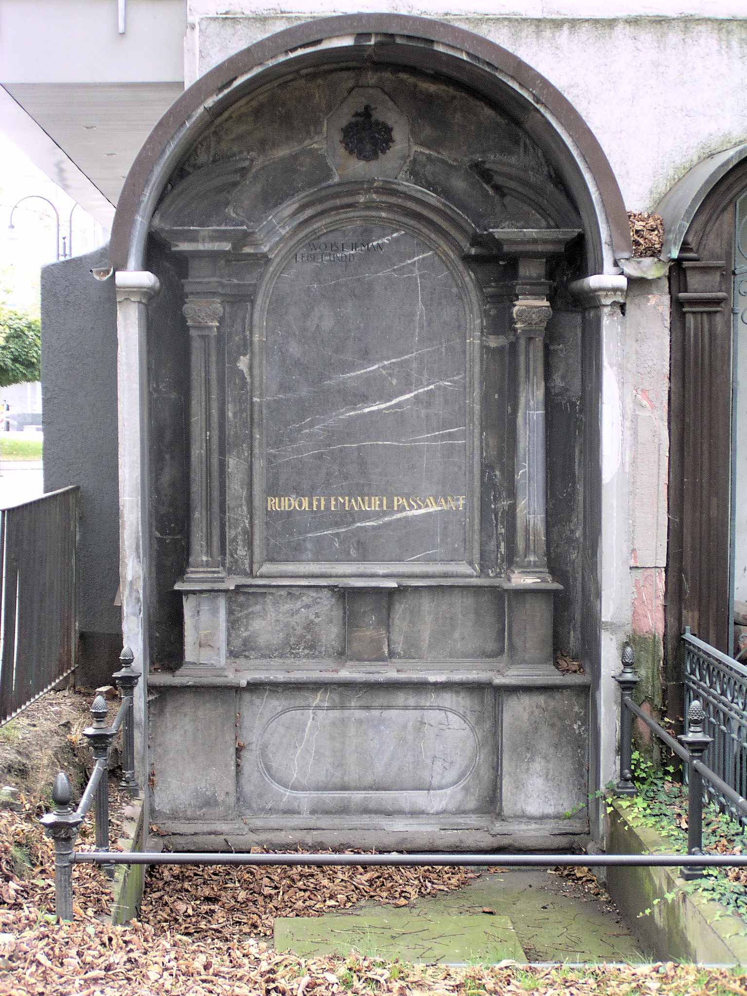 Grabmal von Rudolf Emanuel Passavant (Frankfurter Bürgerkapitän und Unternehmer, 1641–1718), auf dem Kirchhof der Peterskirche. Passavant war Begründer der jüngeren Frankfurter Linie der Familie.